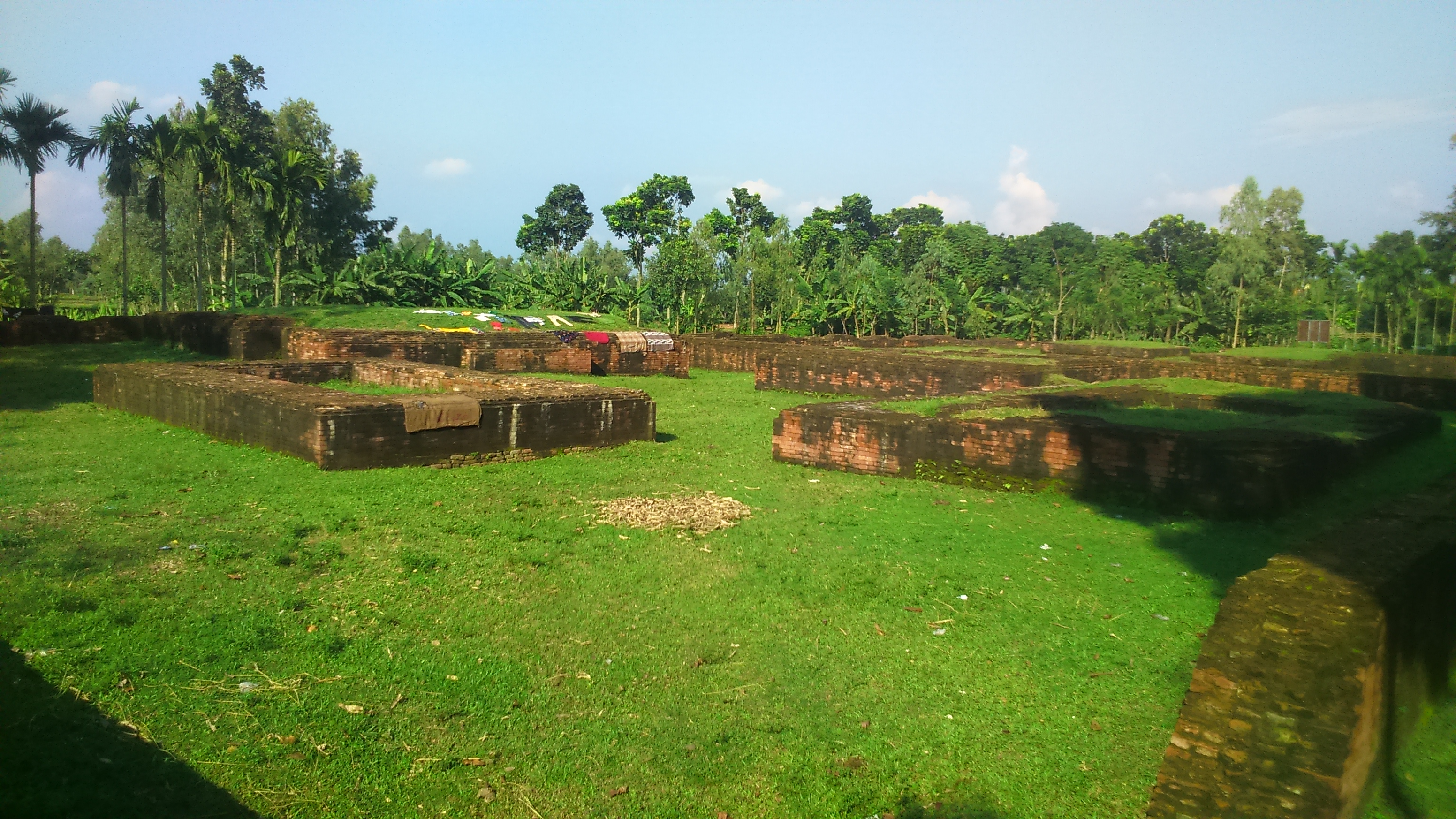 পরশুরামের প্রাসাদ